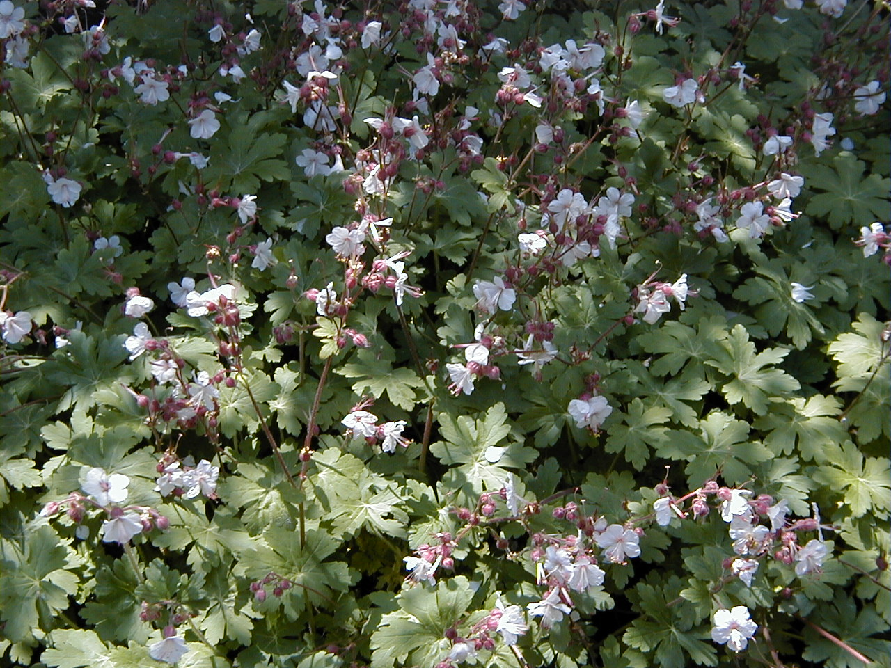 Geranium macrorrhizum. Real Jardín Botánico, Madrid.